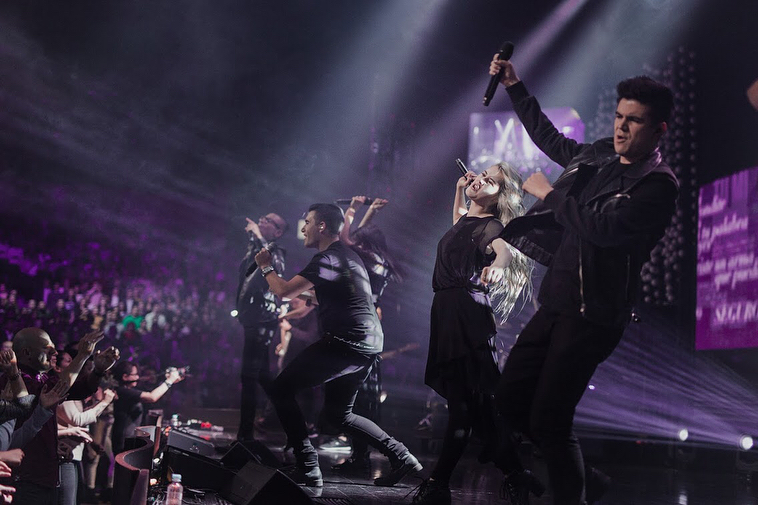 En vivo - enero 2018